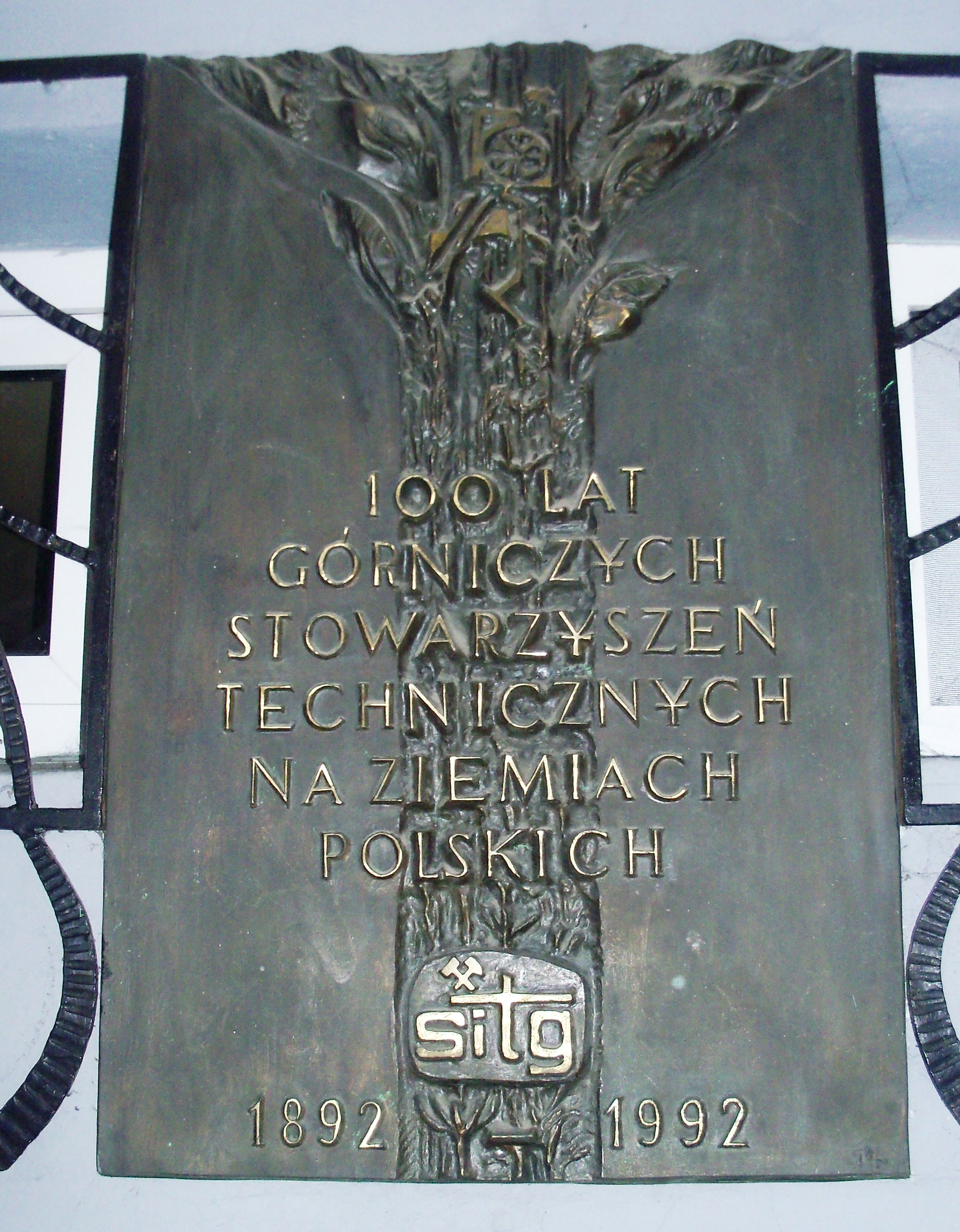 tablica pamiątkowa na budynku przy ul. Powstańców 25 w Katowicach